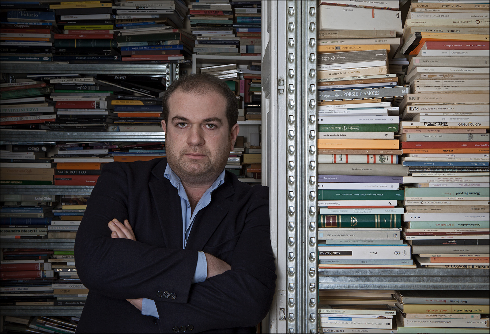 Andrea_di_consoli.jpg